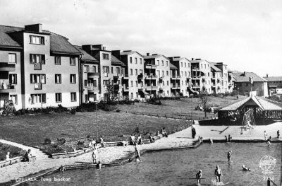 Tuna Backar utanför Uppsala